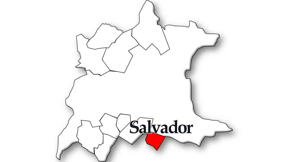 População